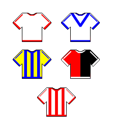 Las camisetas de los aspirantes a sexto grande.